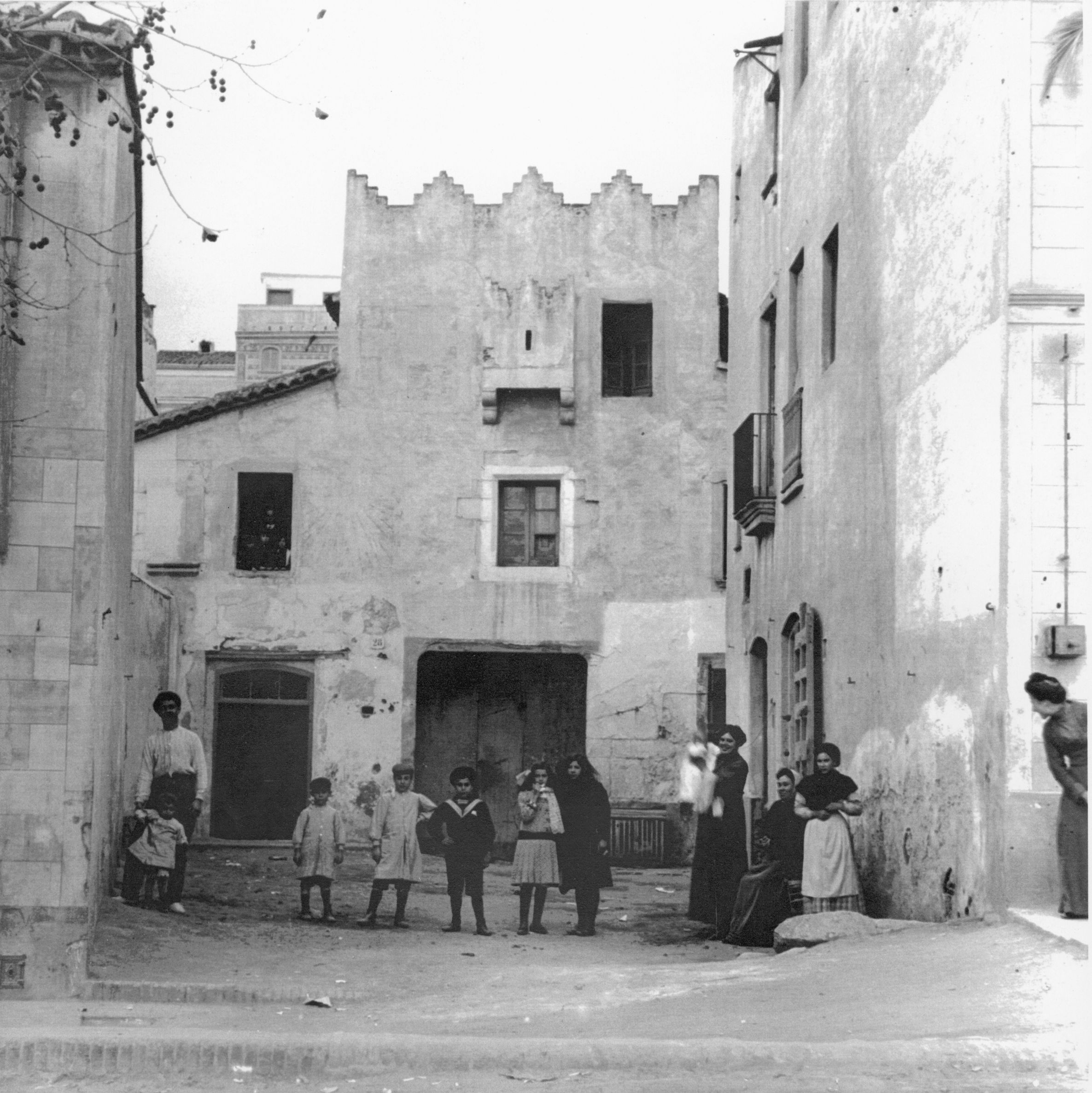 Casa senyorial antiga de Masnou. Josep Salvany i Blanch (1912)